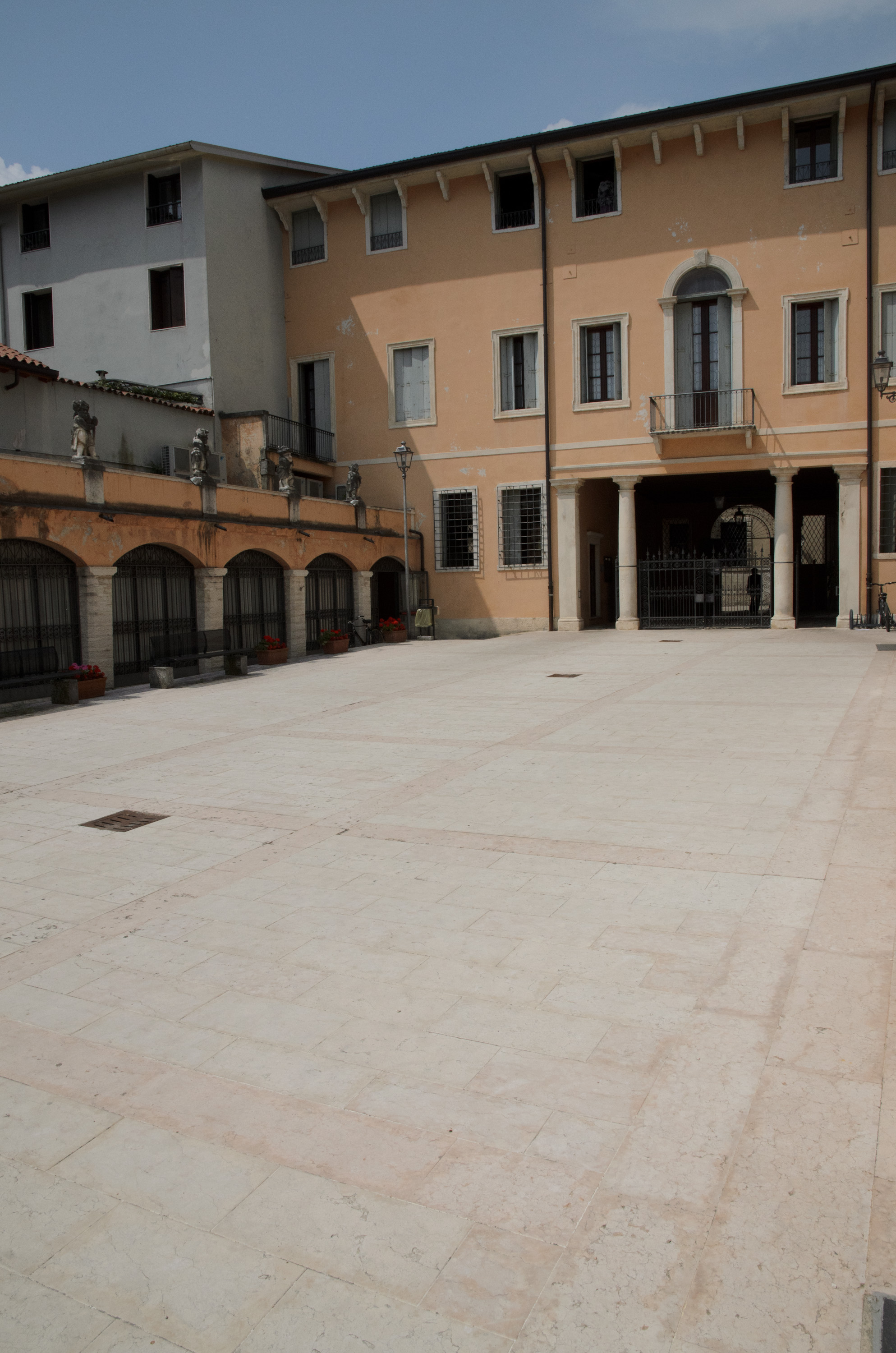 Il cortile di Palazzo Festari. Valdagno(VI) Italia